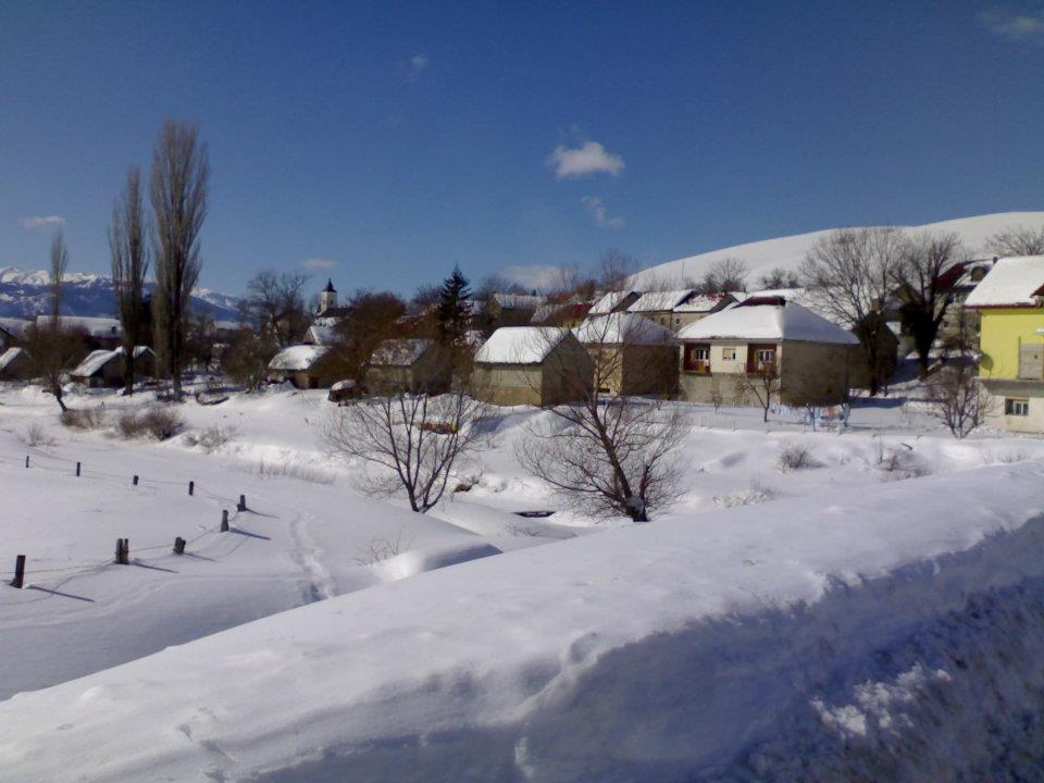 зимска идила